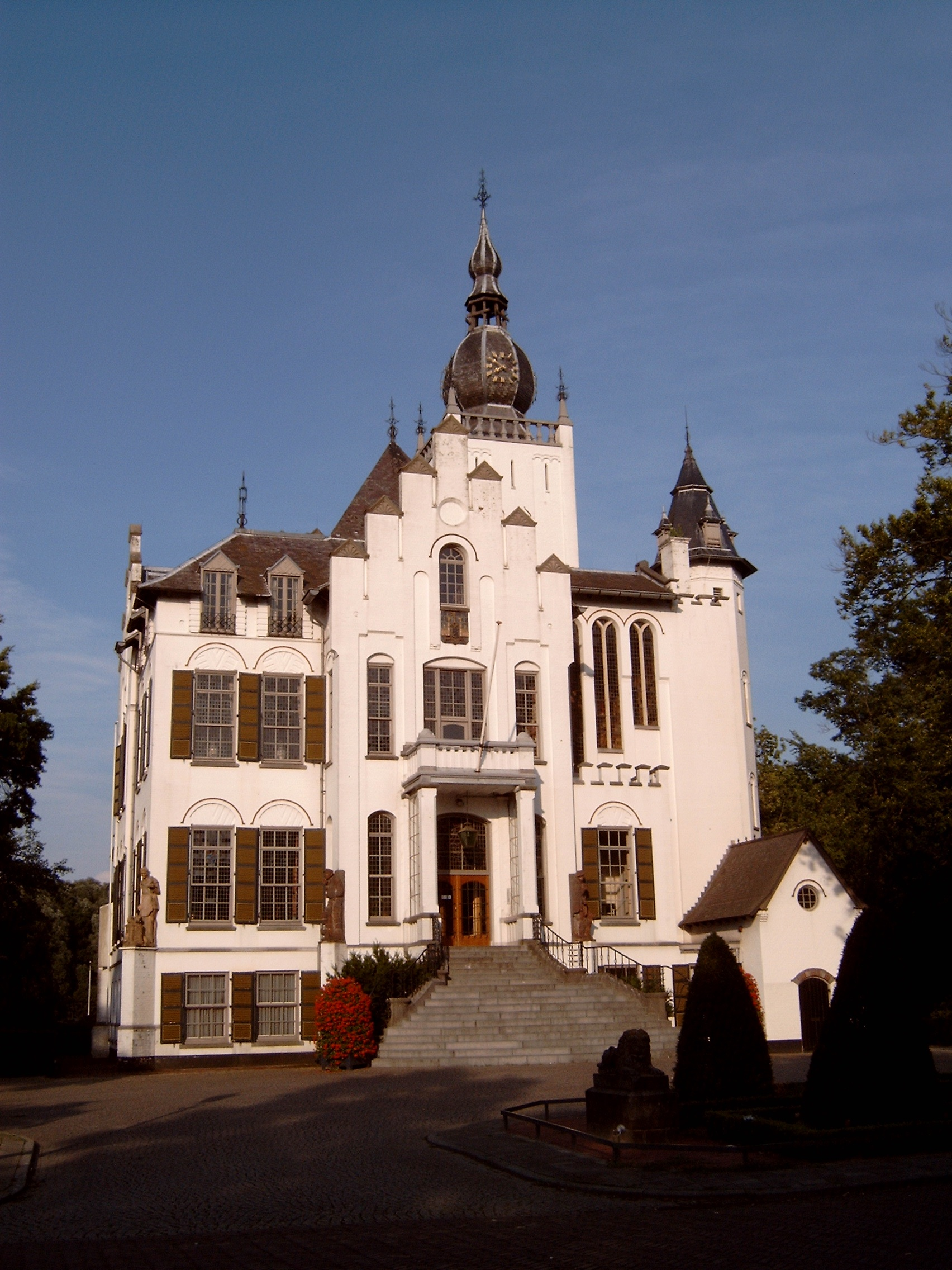 Vught, stadhuis